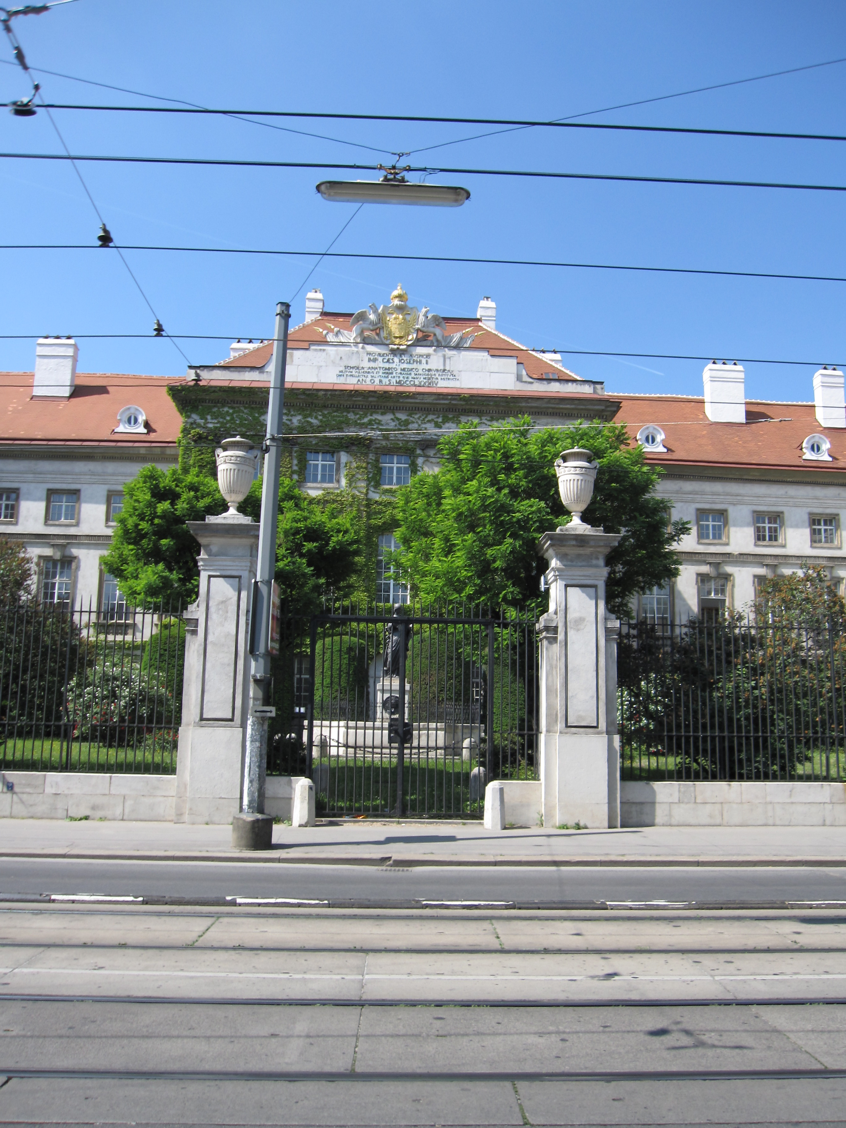 Josephinum in Vienna.